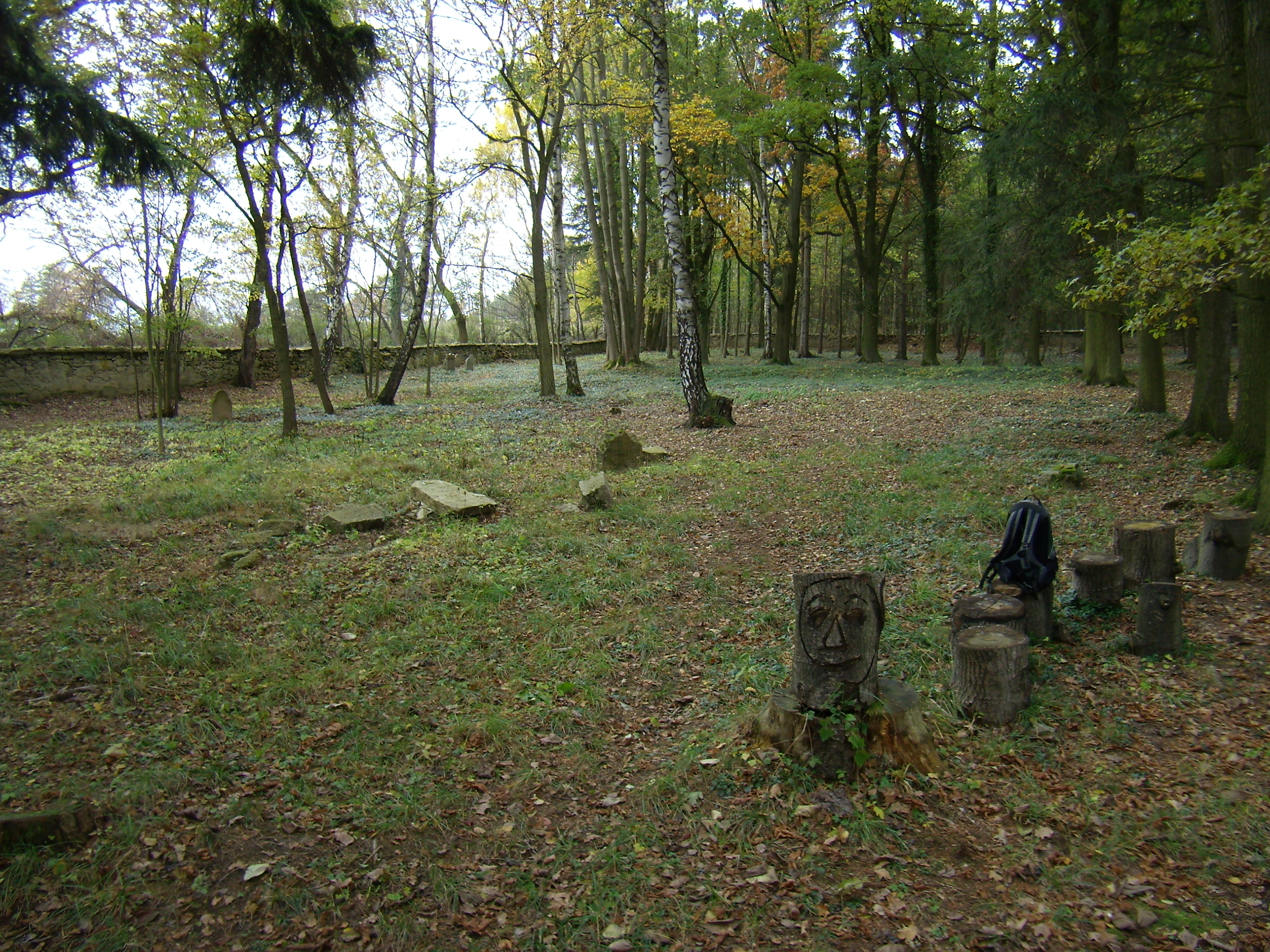 Stráž u Tachova 01 ŽH